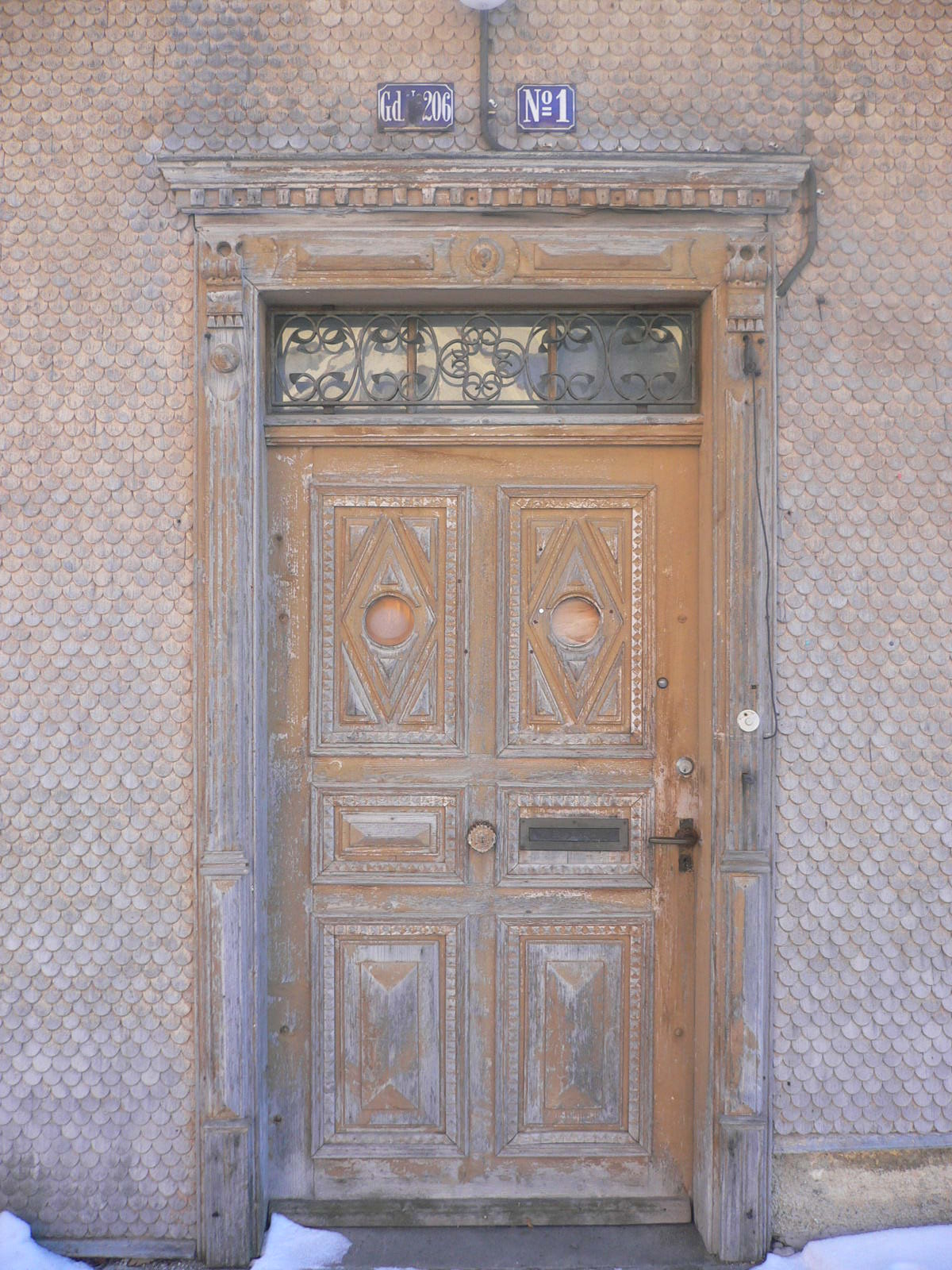 Haustüre des denkmalgeschützten Pfarrhofs in Maria Rain, Oberallgäu